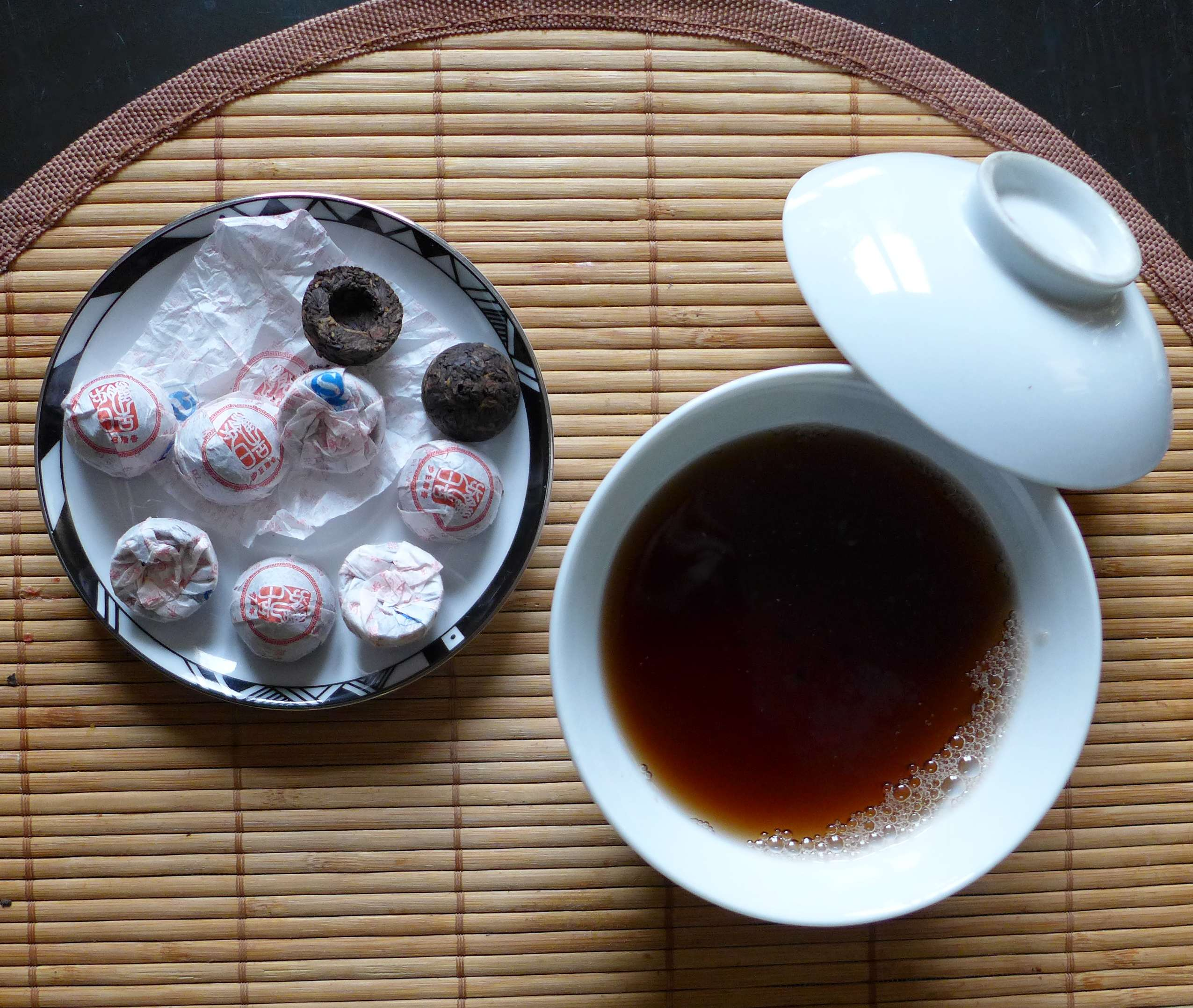 Infusion de xiao tuocha